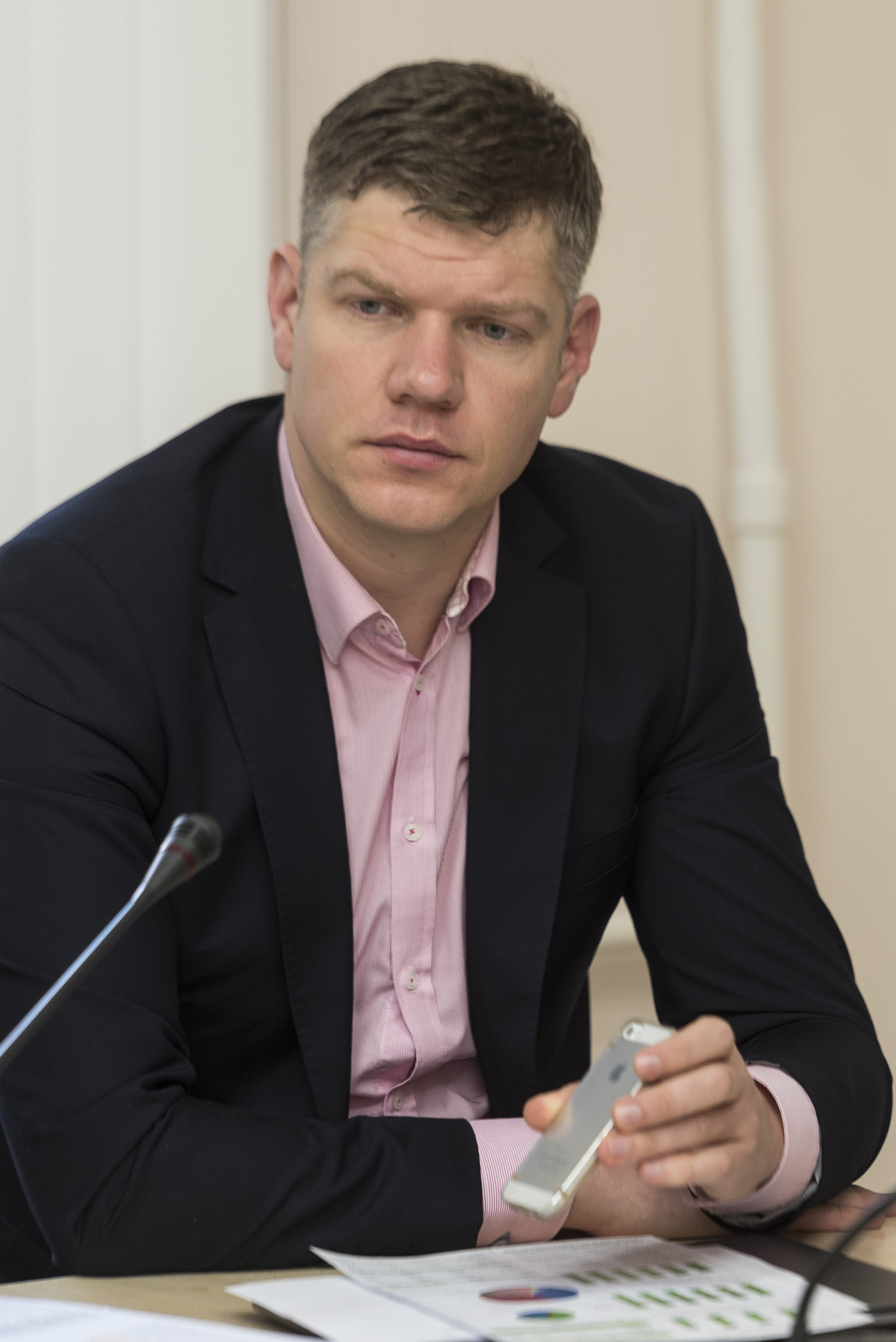 2016.gada 19.oktobris. Budžeta un finanšu (nodokļu) komisijas sēde. Foto: Reinis Inkēns, Saeimas Administrācija Izmantošanas noteikumi: saeima.lv/lv/autortiesibas